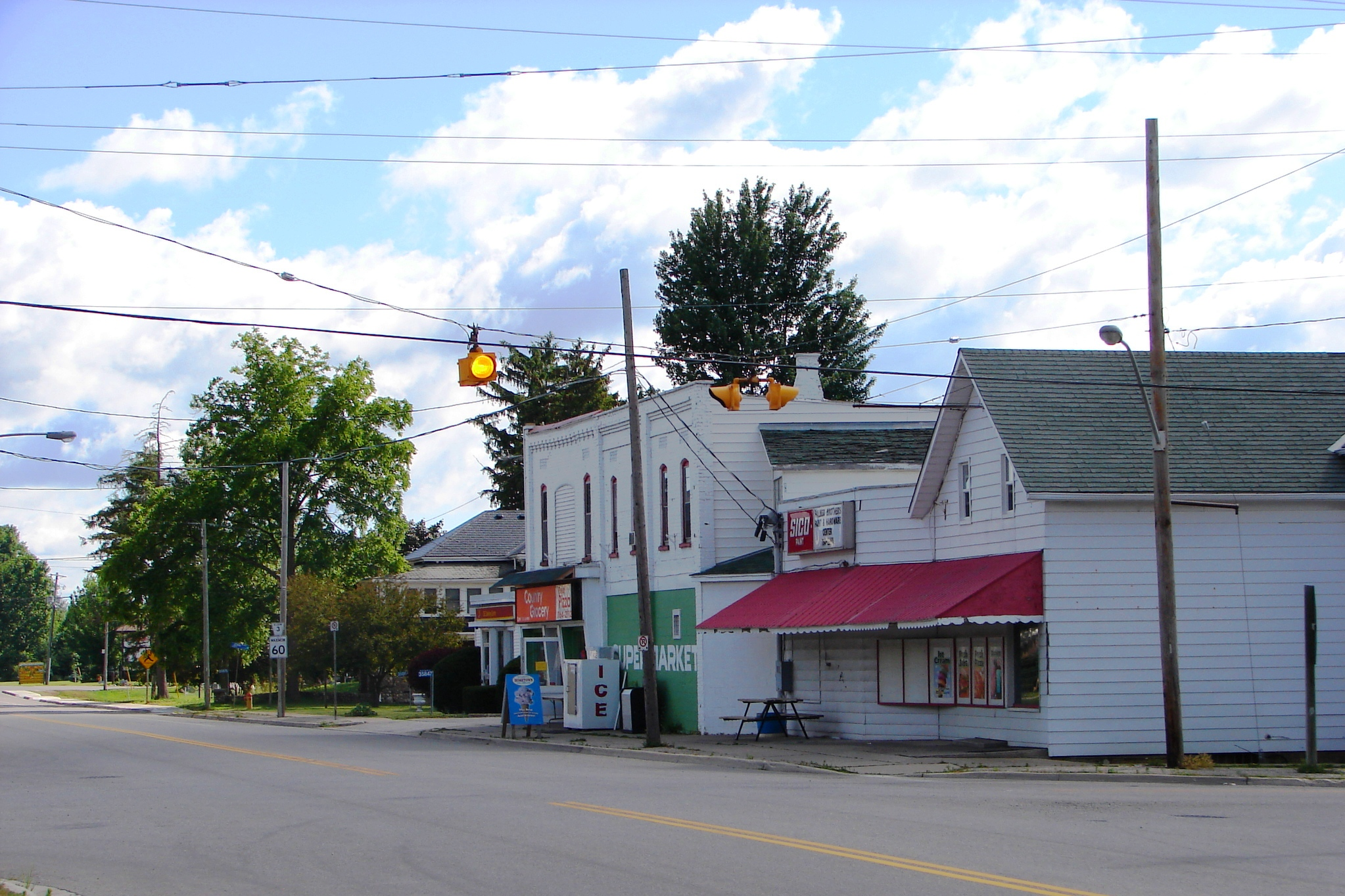 Shedden, Ontario, Canada